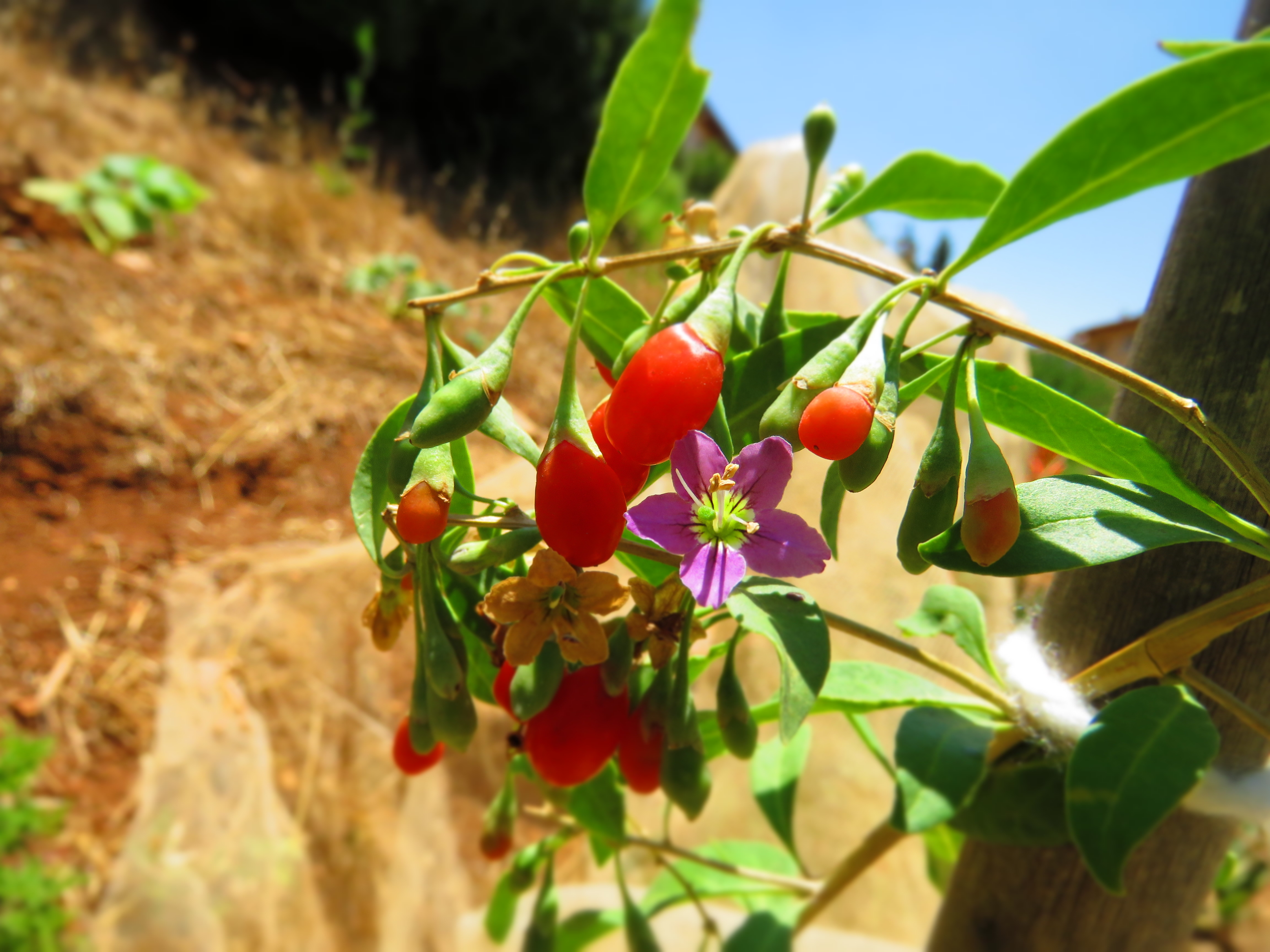 גוג'י ברי פריחה ופרות